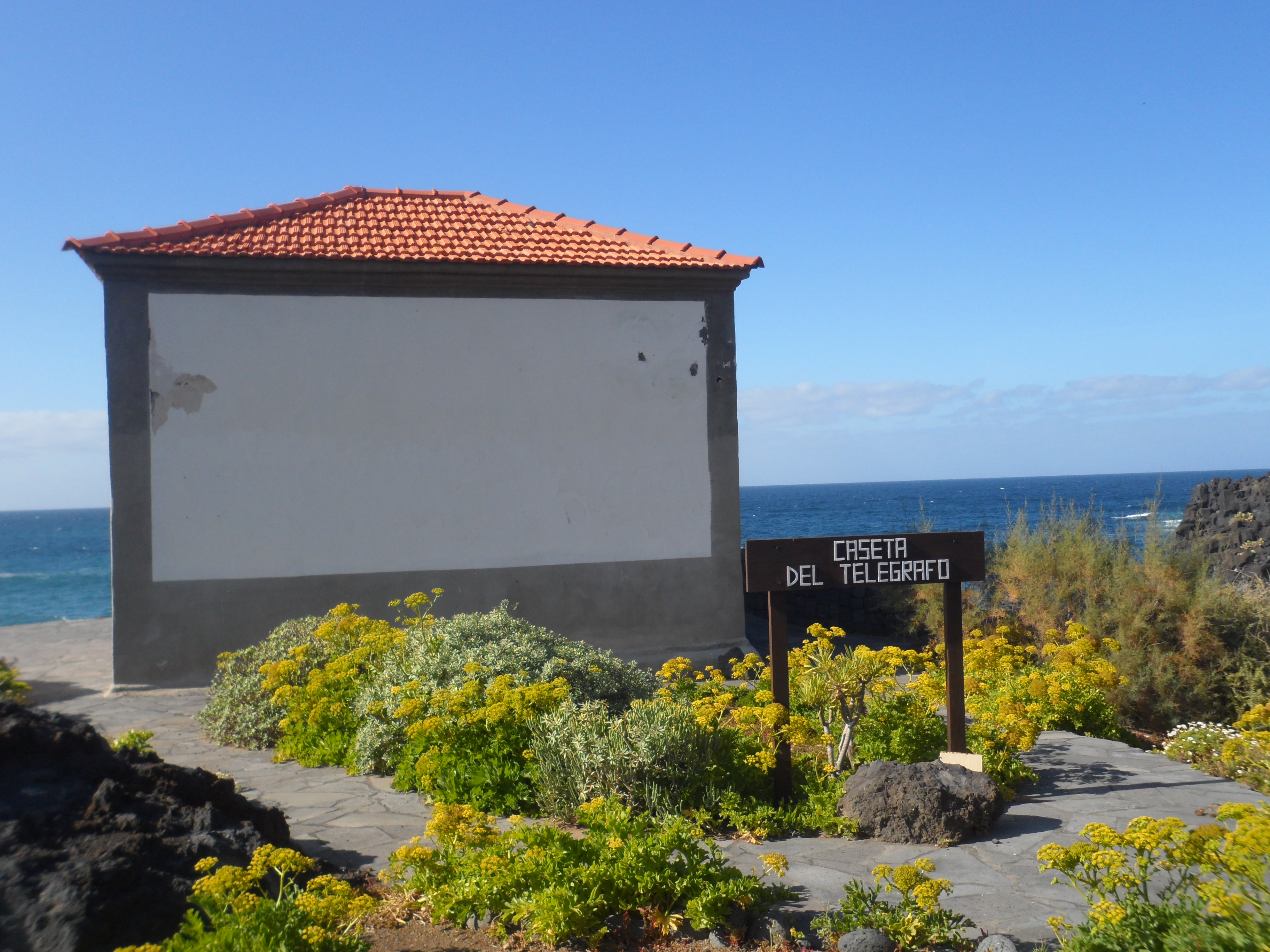 Caseta de Telégrafo. La Caleta (Los Silos)